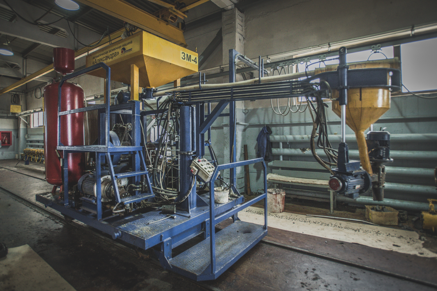 АЗМ для получения ППМ изоляции в цеху.